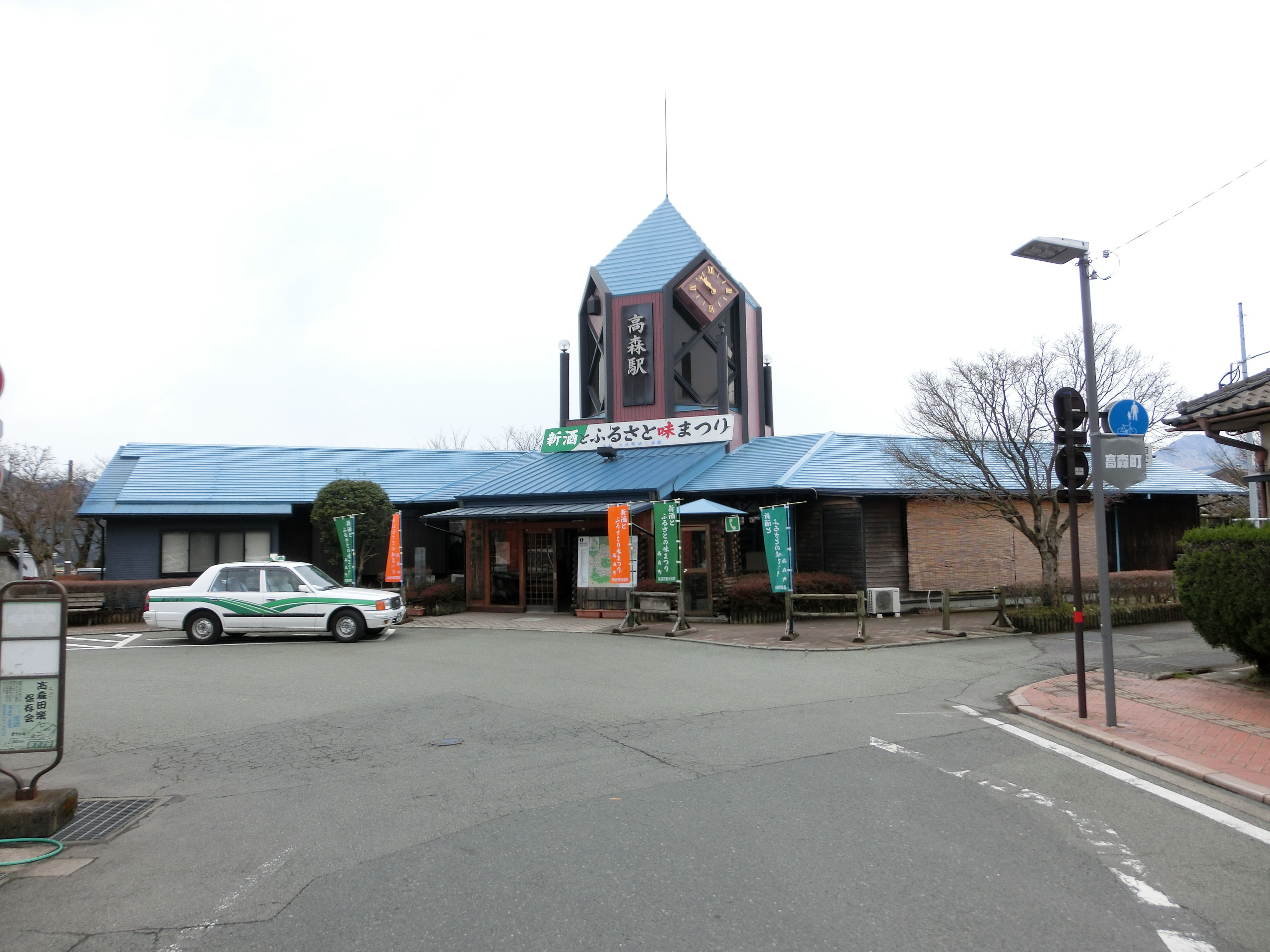 高森駅の駅舎